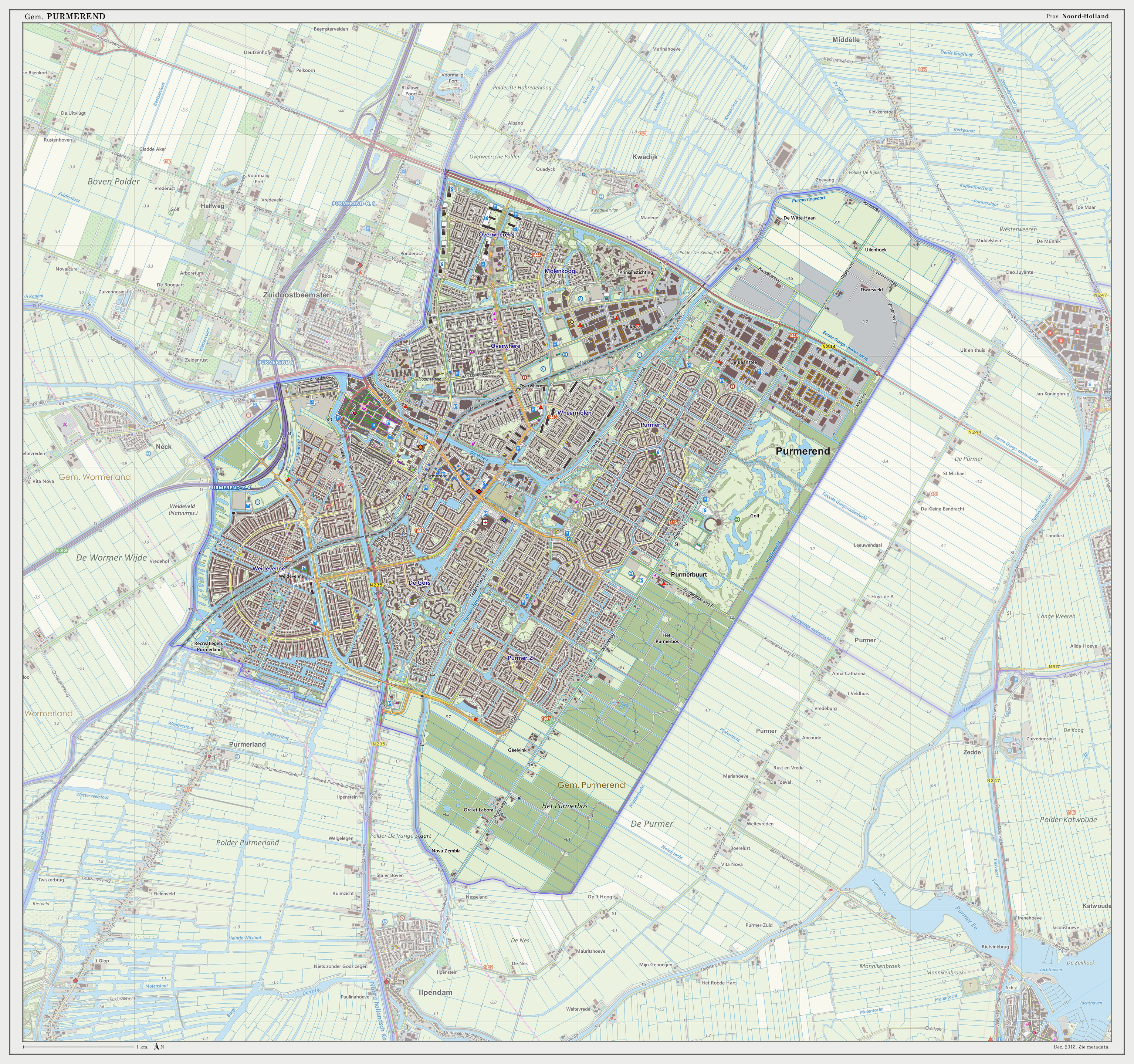 Topografische gemeentekaart. Resolutie: 300 pixels/km. Kaartbeeld samengesteld met de open geodata van de Top10NL en Top25namen (Basisregistratie Topografie, Kadaster 30-nov-2013), o.b.v. Creative Commons BY licentie. Gebouwvlakken uit Open Geodata BAG extract (8-dec-2013). Wegen uit de OpenStreetMap (15-dec-2013). Samenstelling en kleurenschema: Jan-Willem van Aalst, met QGIS2 en Adobe Photoshop. Zie ook de Legenda.